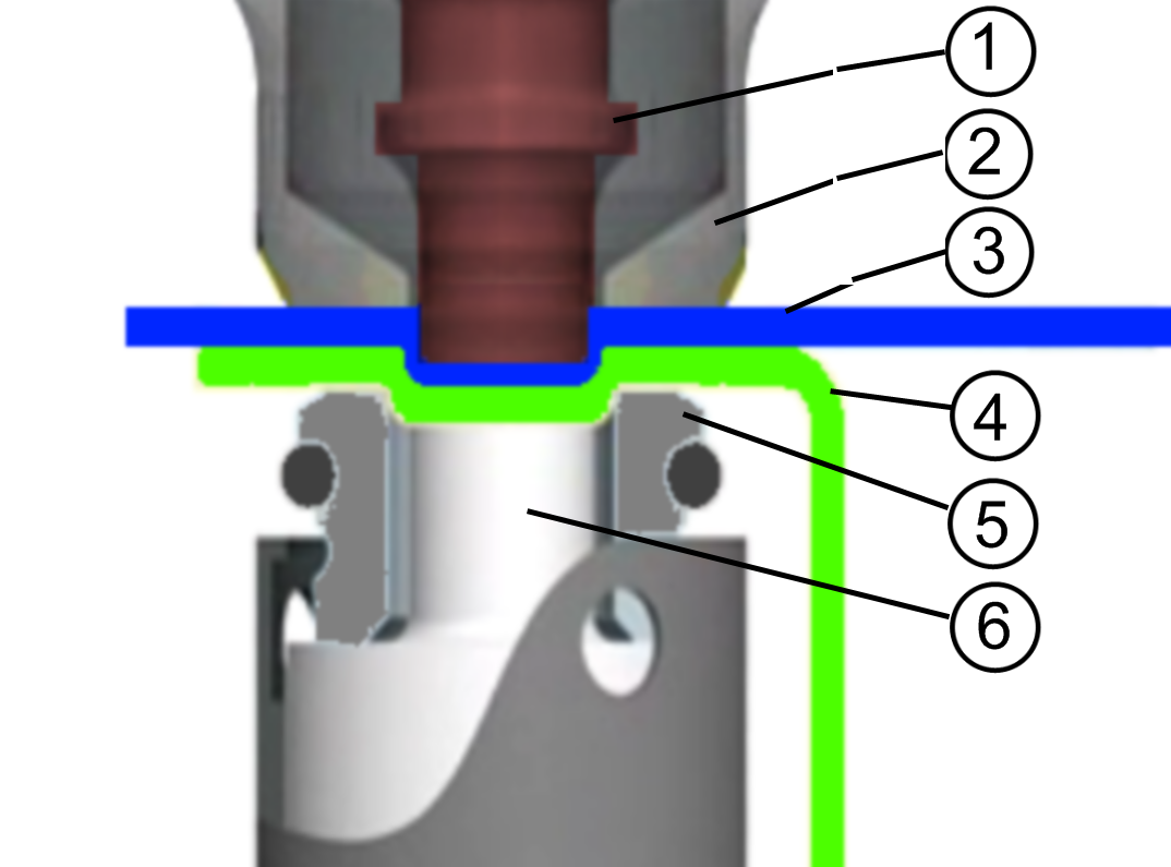 sertissage de toles